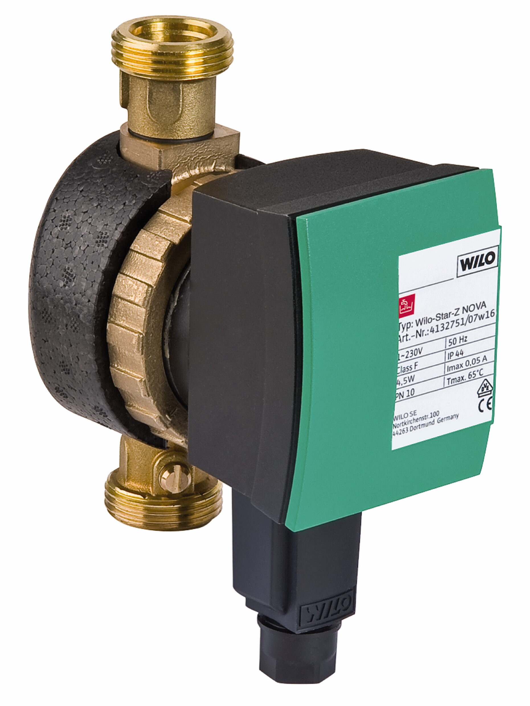 pompa cyrkulacyjna Wilo STAR Z do ciepłej wody użytkowej